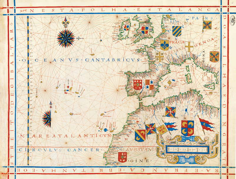 Atlas portugués de 1571